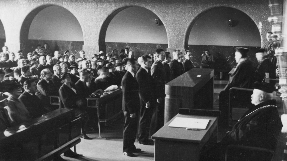 ...vystudoval biologii a antropologii na Přírodovědecké fakultě UK (doktorát 1937)... • (Tato rubrika obsahuje fotografie z průběhu celého Broukova života, tzn. z let 1912-1978.) Na fotografii je Collegium maximum (místnost č. 100) v budově Právnické fakulty UK.